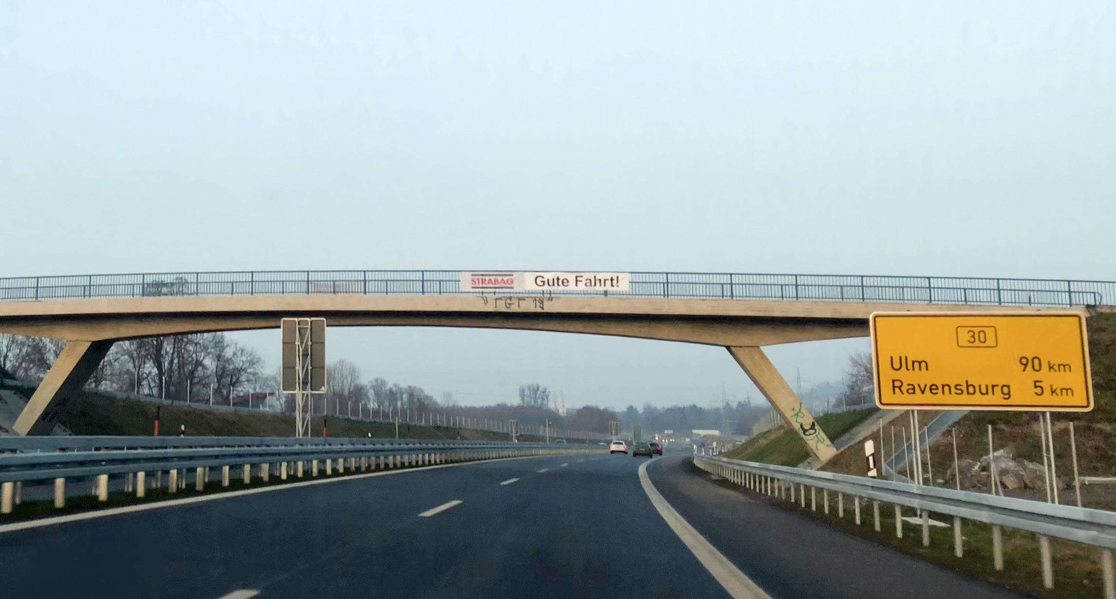 B30 neu nach der AS Oberzell/Karrer; Richtung Norden AS Ravensburg-Süd